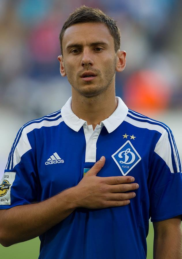 Сергій Рибалка - футболіст Динамо